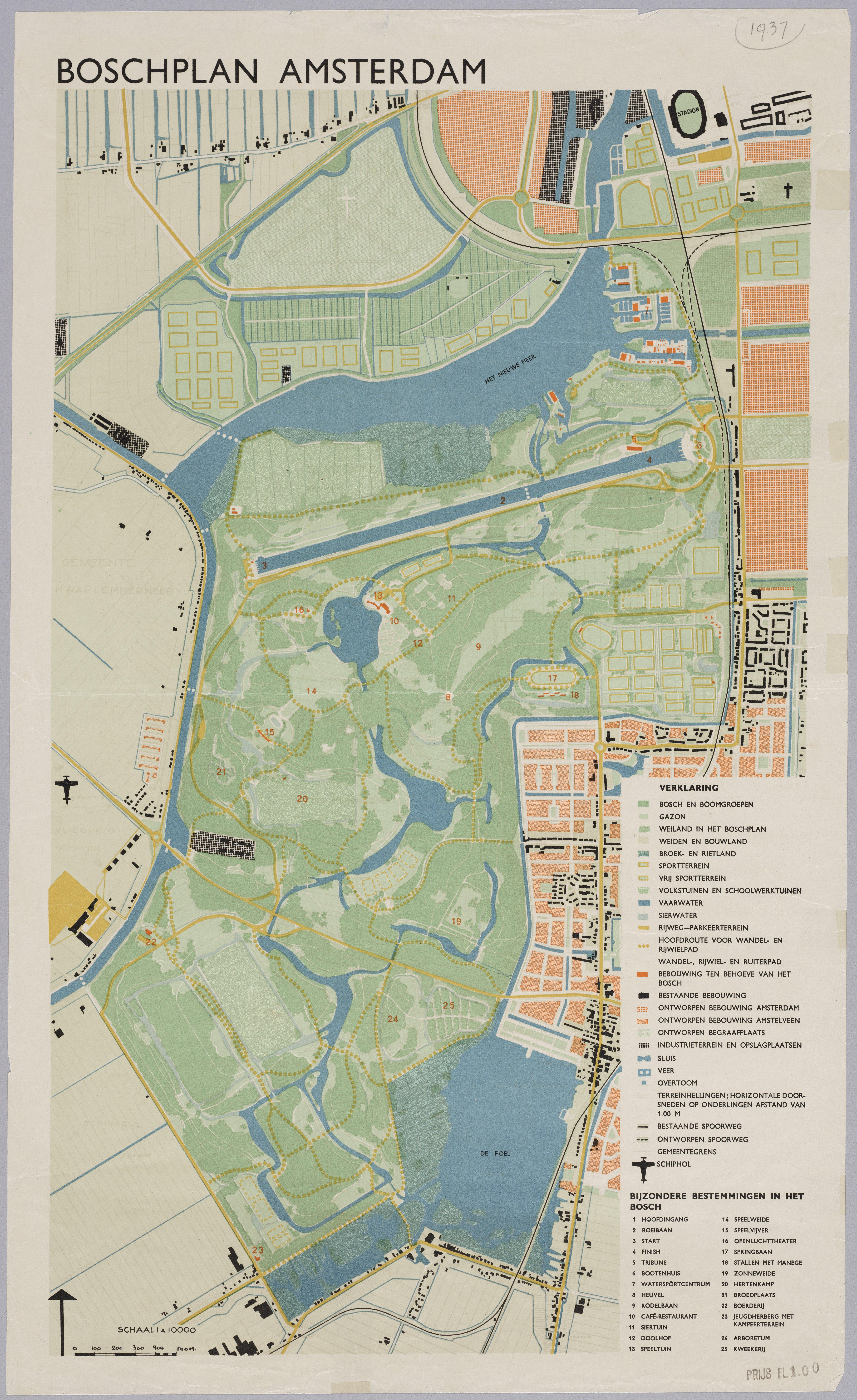 Beschrijving Overzichtskaart van het bosplan. Schaal: 1:10.000 Documenttype kaart Vervaardiger Onbekend Anoniem Collectie Archief van het Amsterdamse Bos Datering 1937 Inventarissen Afbeeldingsbestand B00000029281 + - 70% Leaflet Generated with Dememorixer